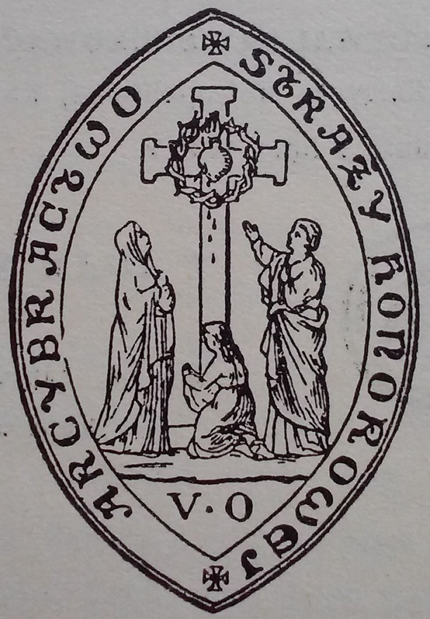 Logo Straży Honorowej Najświętszego Serca Pana Jezusa. Umieszczane na publikacjach. Fotografia ze strony tytułowej książki z 1932 roku.